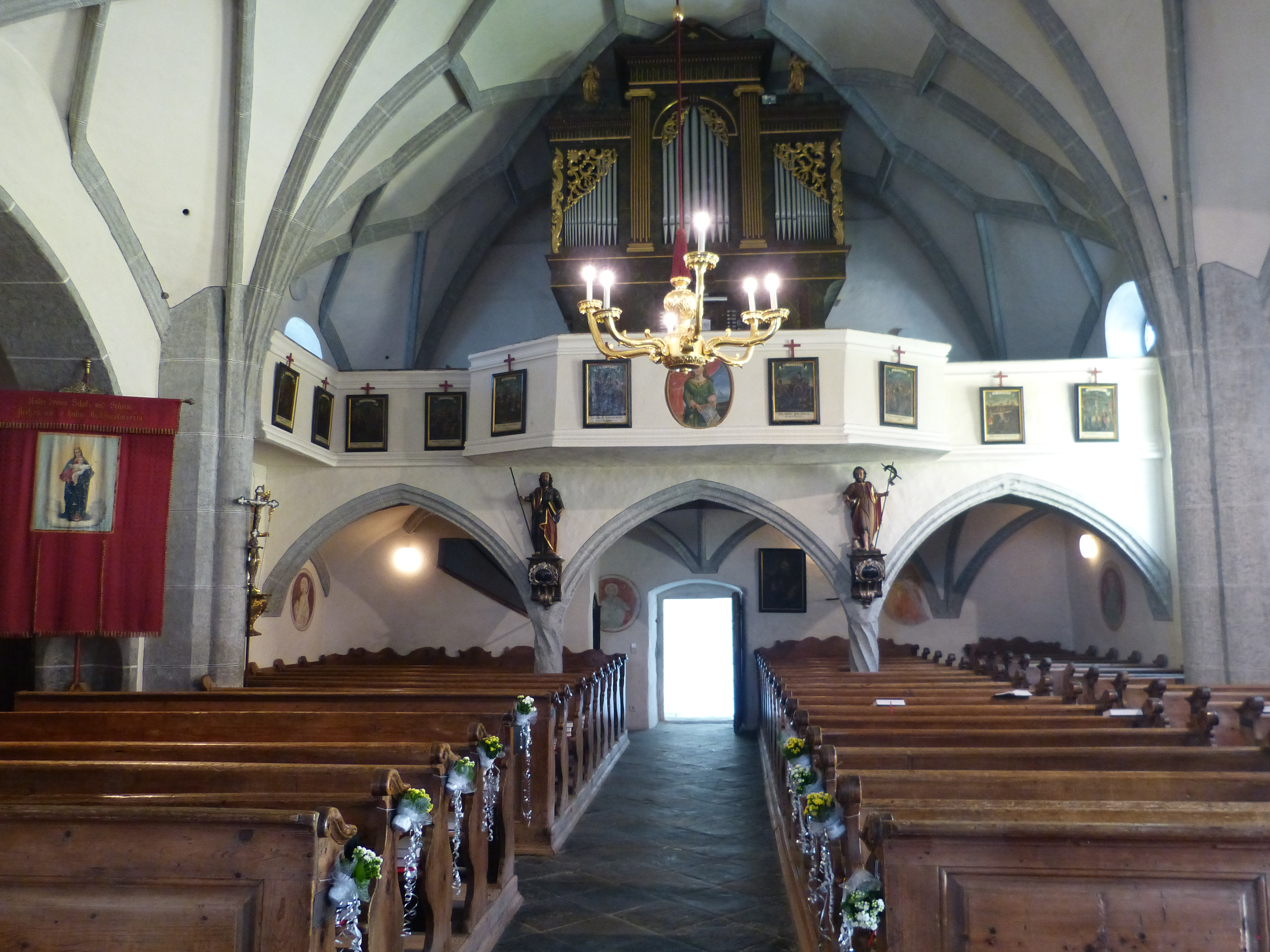 Pfarrkirche Pulst (Gemeinde Liebenfels, Kärnten): Empore auf gedrehten spätgotischen Säulen.